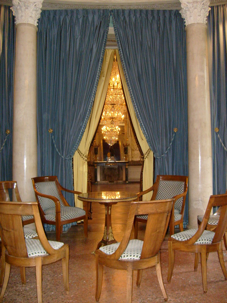 Perspective à travers deux salons du Palais Eynard à Genève (Suisse)